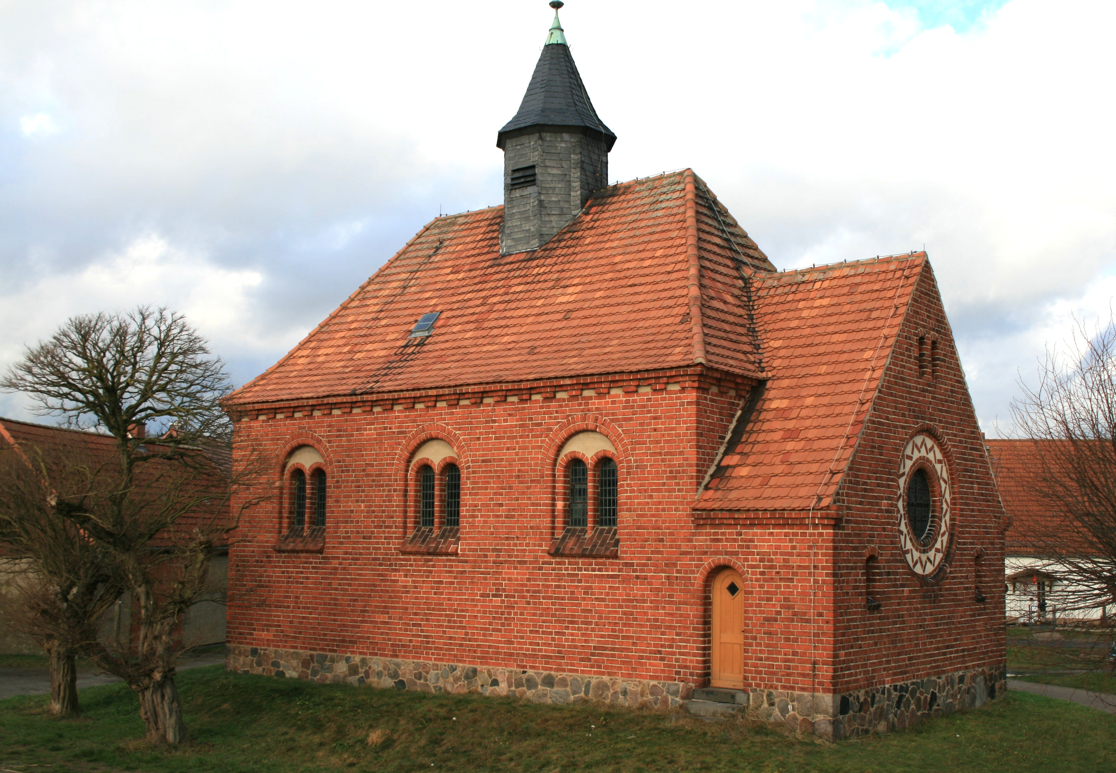 Südostansicht der Dorfkirche